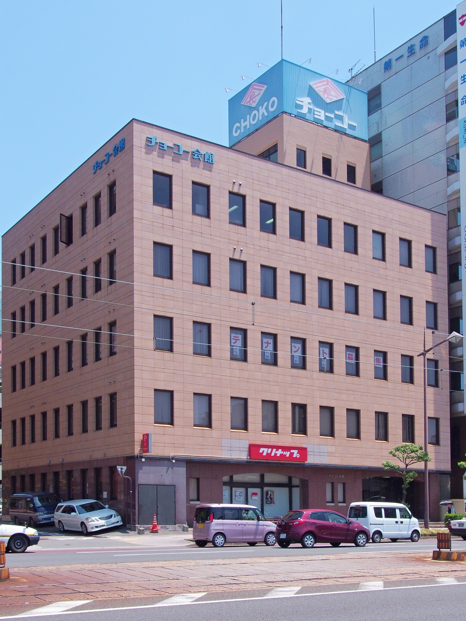 チョーコー会館ビル。（長崎県長崎市）